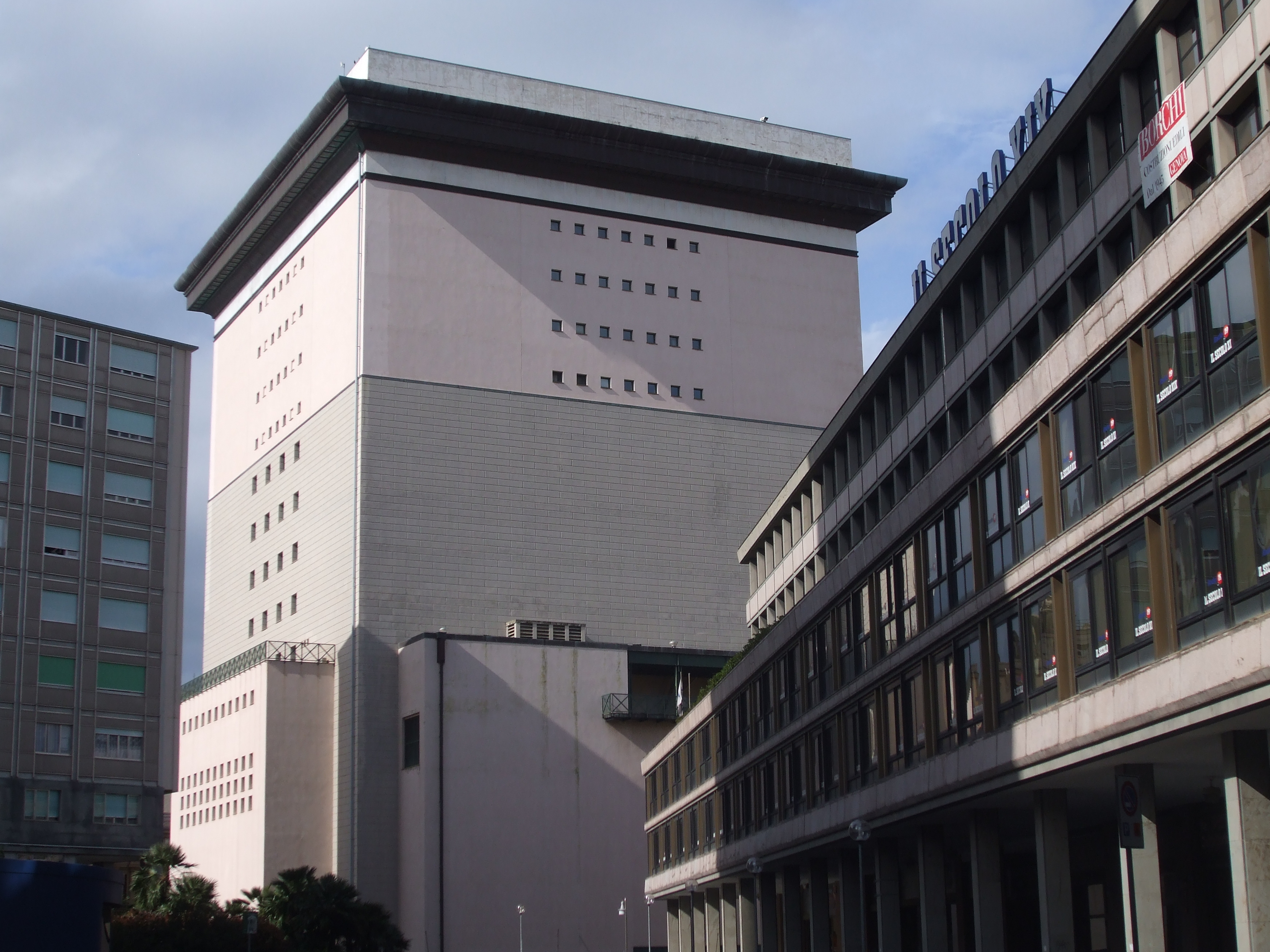 Teatro Carlo Felice visto dalla sede del Secolo XIX p.zza Piccapietra - Genova